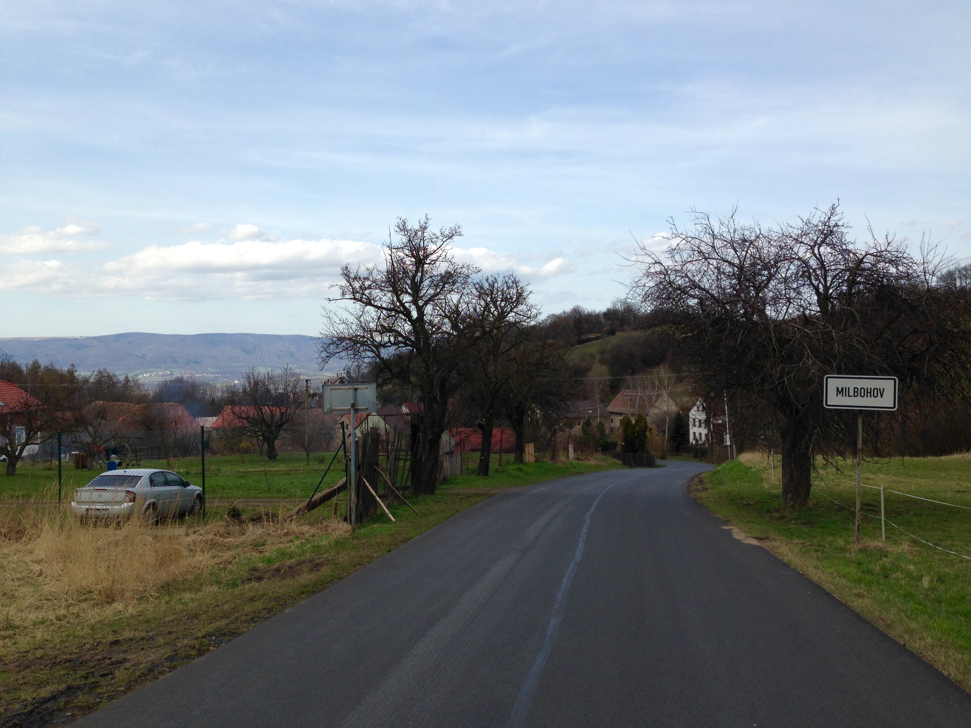 Milbohov, část obce Stebno